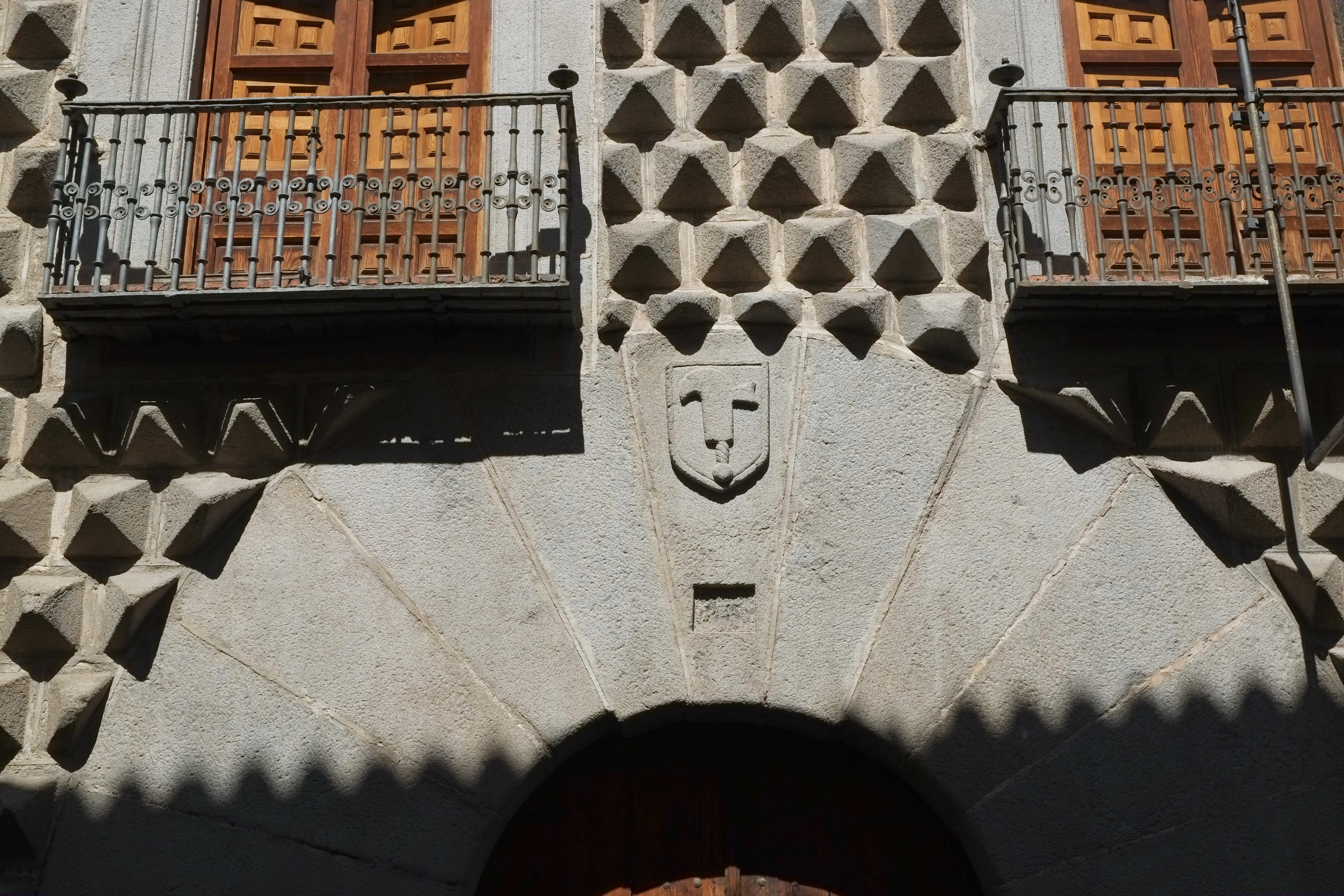 Casa de los Picos in Segovia in Spanien